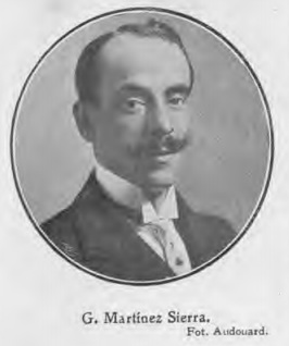 G. Martínez Sierra; fotografía de Audouard.